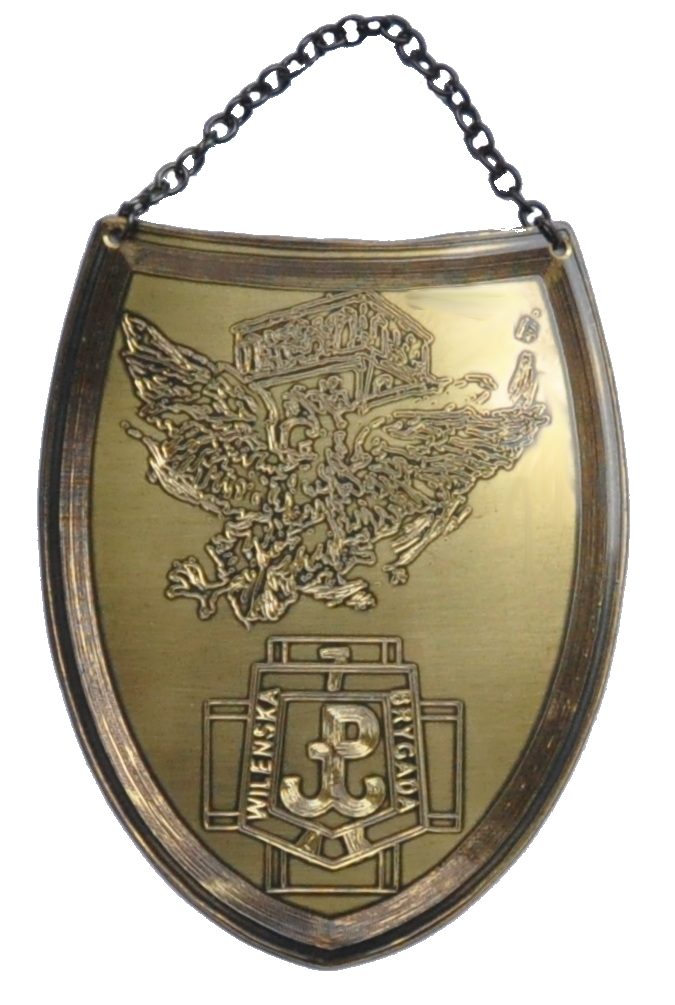 Ryngraf pamiątkowy 7 Brygady Wilhelma